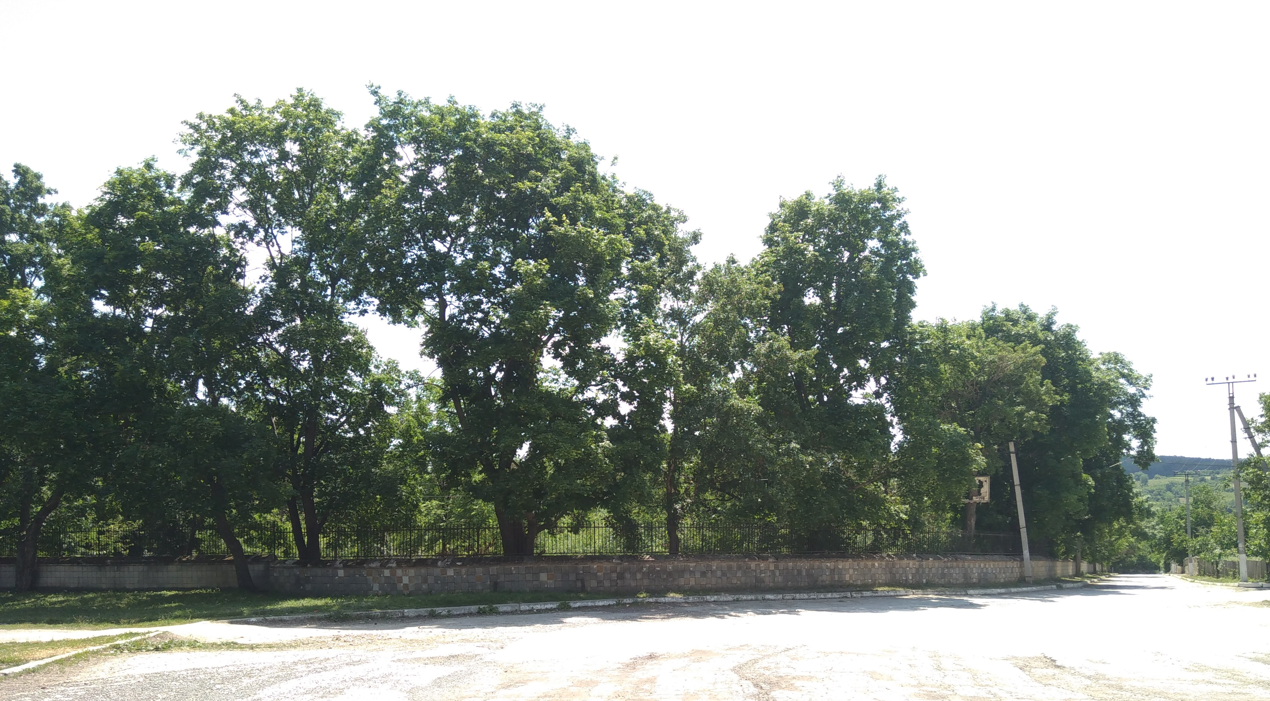 Parcul din satul Ivancea, monument al naturii amplasat în raionul Orhei, satul Ivancea (cod MD-OR-map-017)